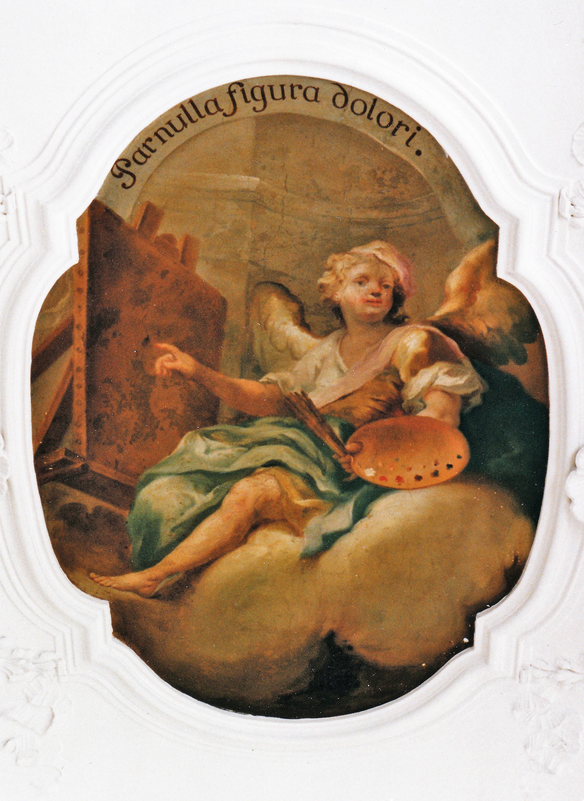 Kreuzgang im Kloster Ottobeuren - Tabula rasa cum instrumentis pictoriis: PAR NULLA FIGURA DOLORI (Kein Bild ist gleich dem Schmerz) (1735-1739) - Vorlage: Jacobus Boschius: Symbolographia I, Sermo IV, X (S. 24)